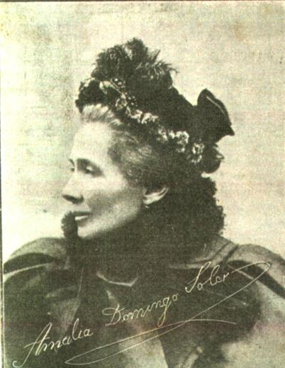 Fotografía de Amalia Domingo Soler, espiritista sevillana